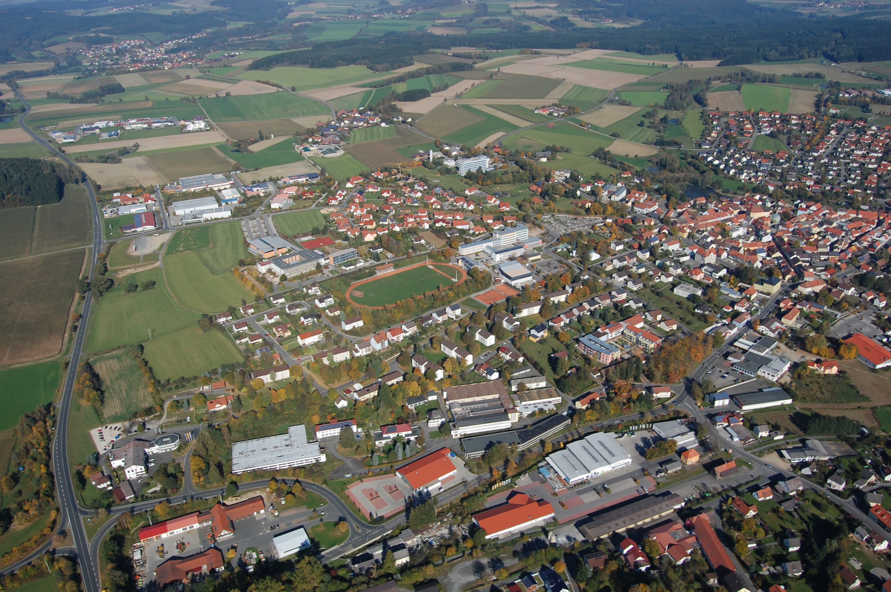 Oberviechtach an der B 22 (Gesamtansicht)